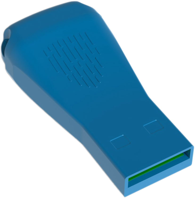 Электронный ключ SecureToken-337 mini (Экспертное заключение ГСССЗИ Украины №05/1-1634 от 28.04.11)